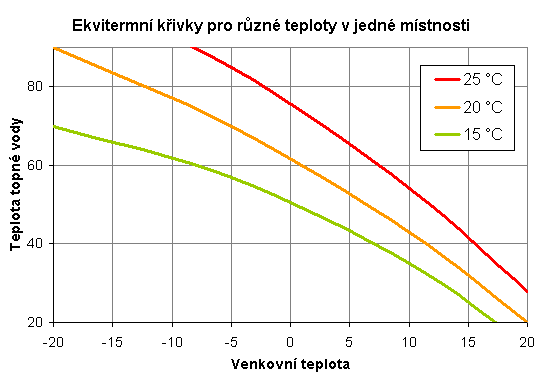 Ekvitermni krivka, curve for room temperature control